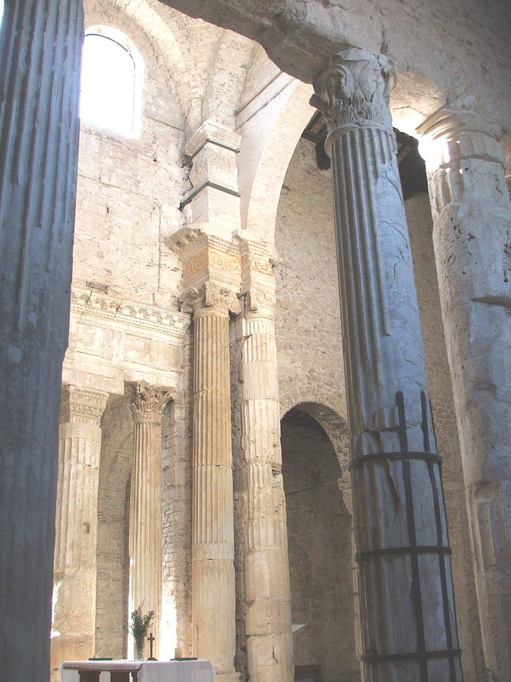 Basilica di San Salvatore (Spoleto) Ldoc